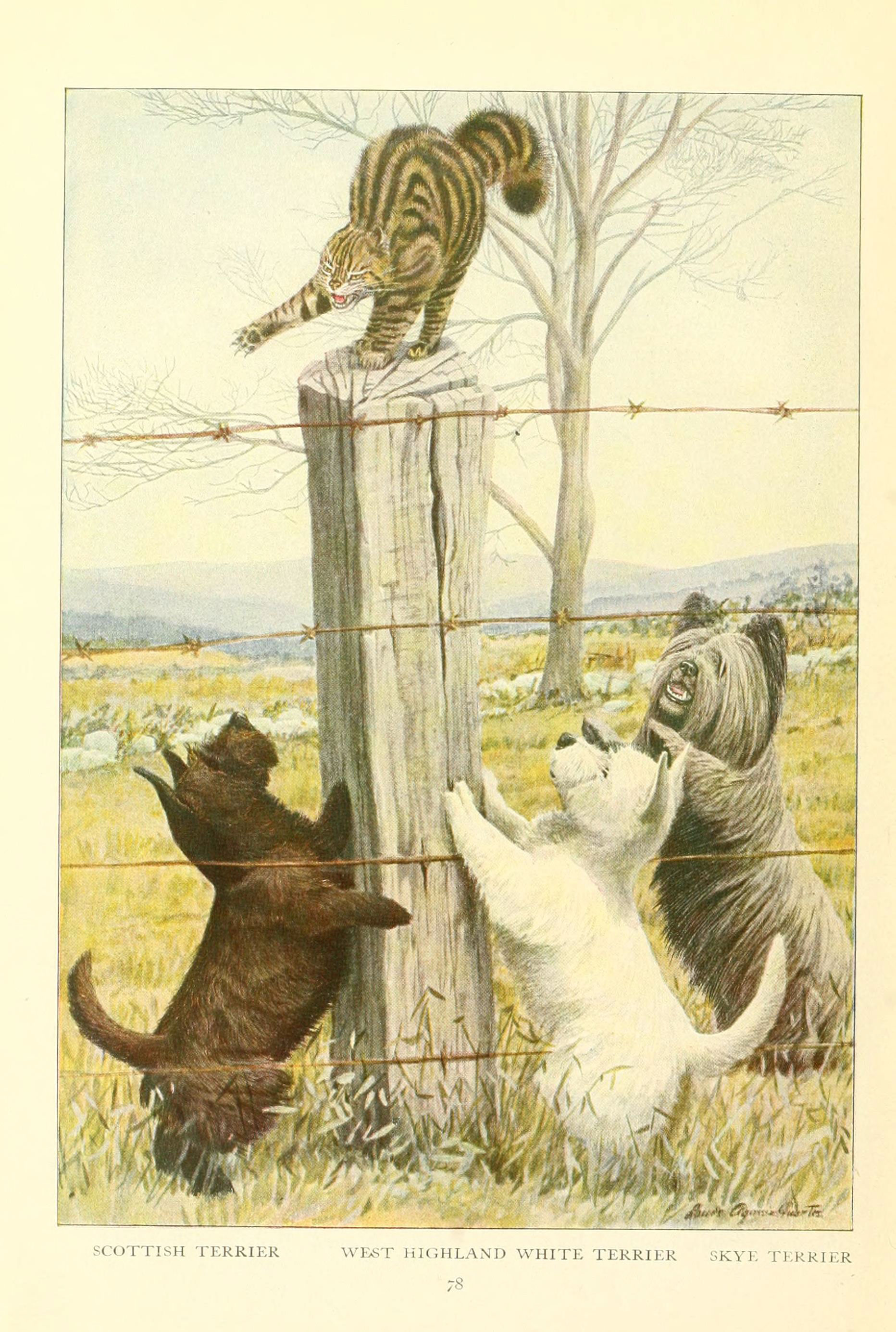 The book of dogs Washington, D. C.,The National geographic society[c1919]